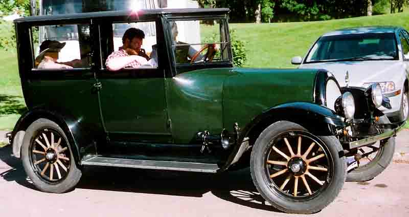 Franklin Model 9-B Sedan 1922